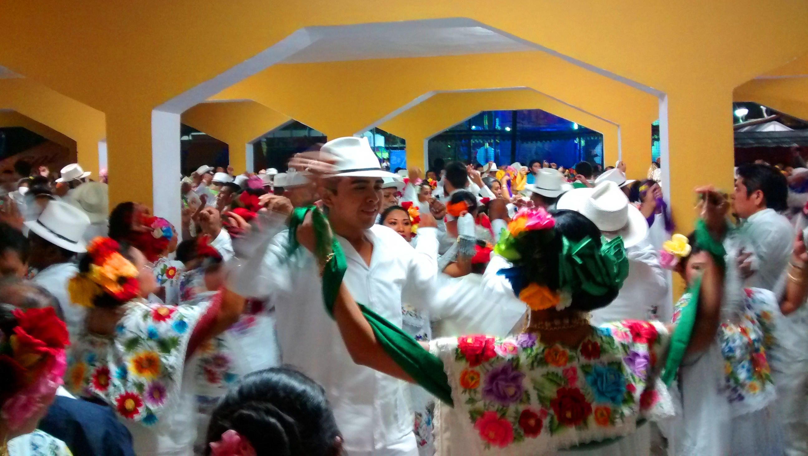 Vaqueria en Acanceh, Yucatán 4